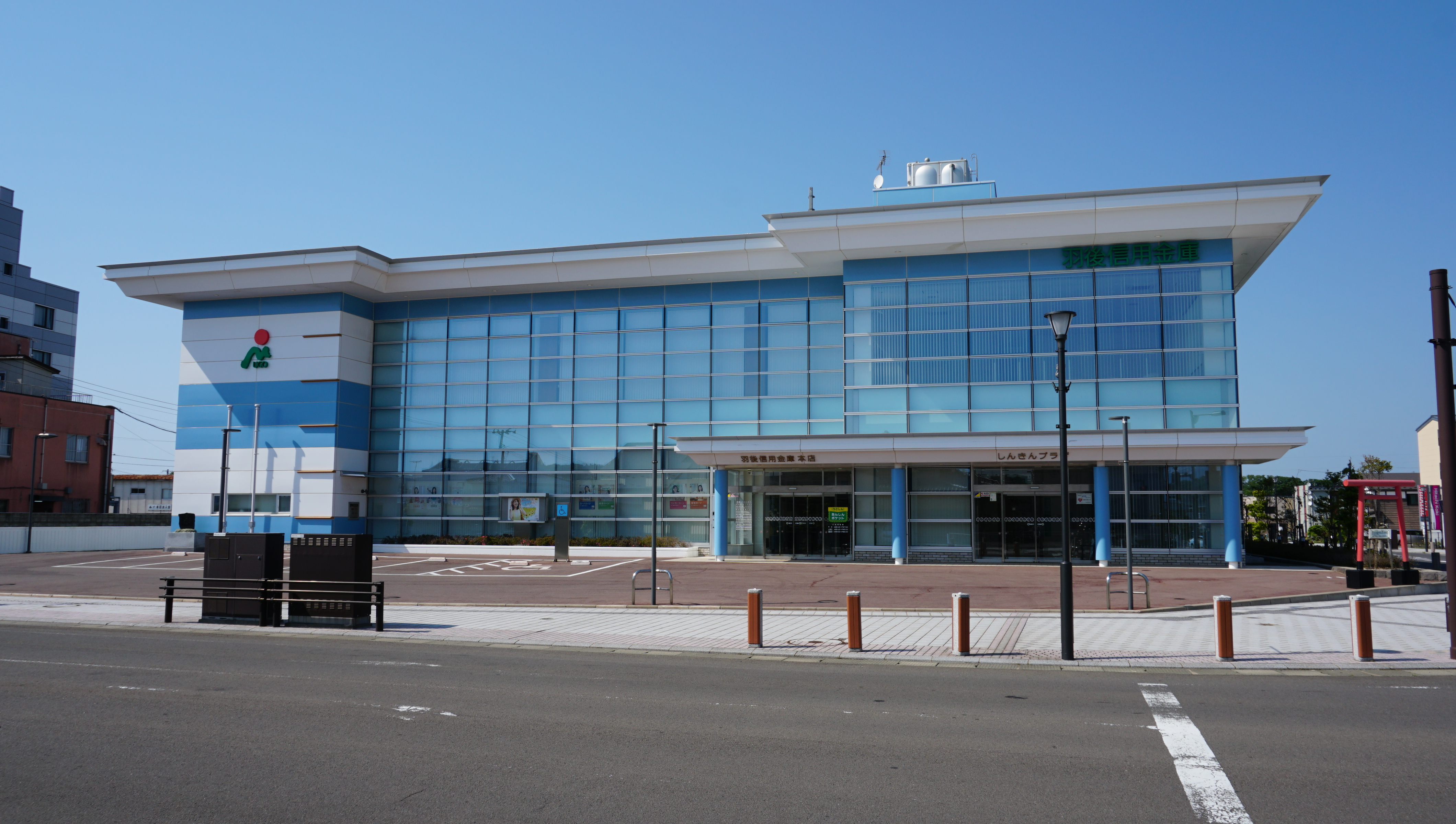 羽後信用金庫本店（秋田県由利本荘市）